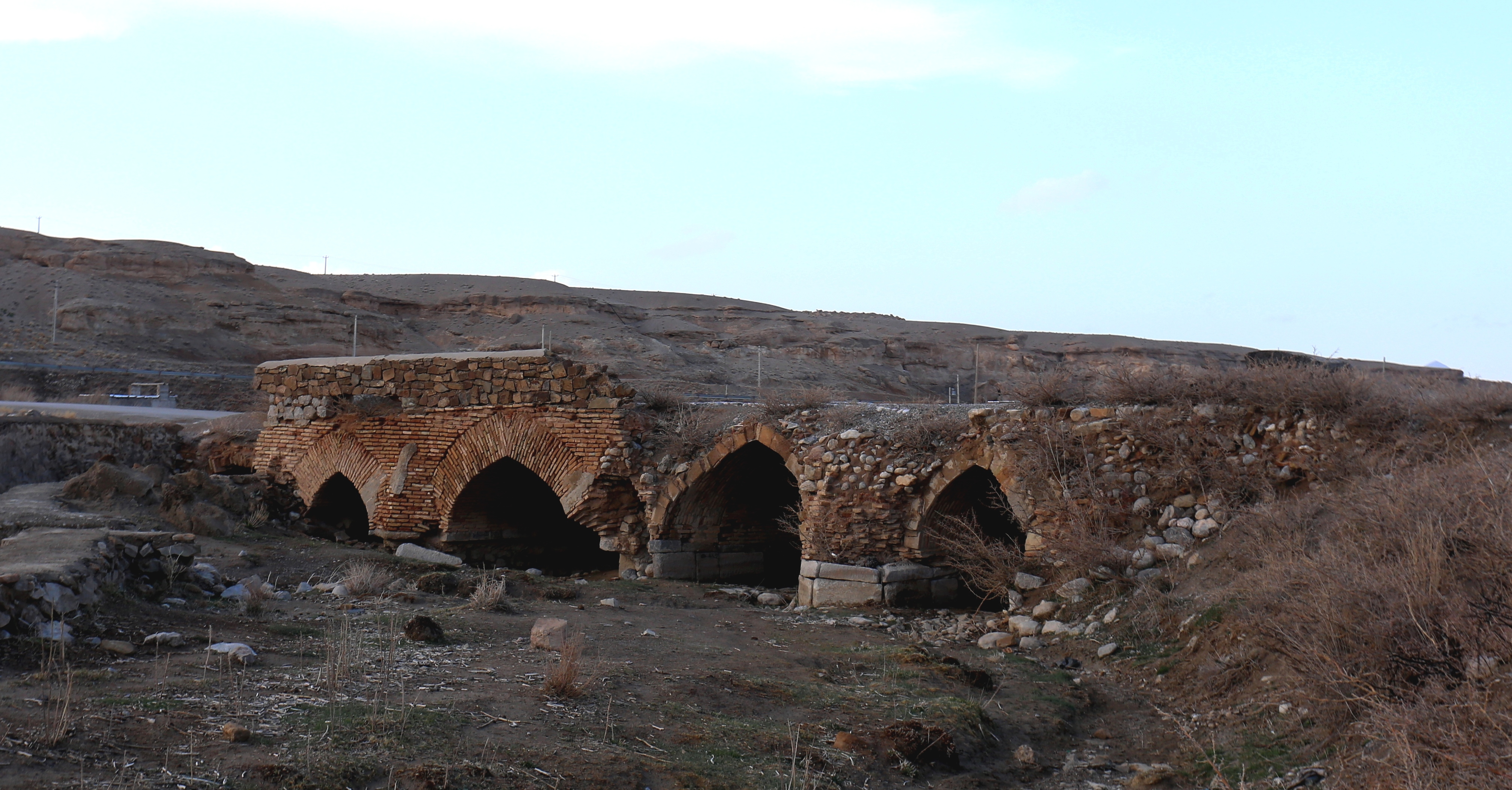 پل ایزد خواست